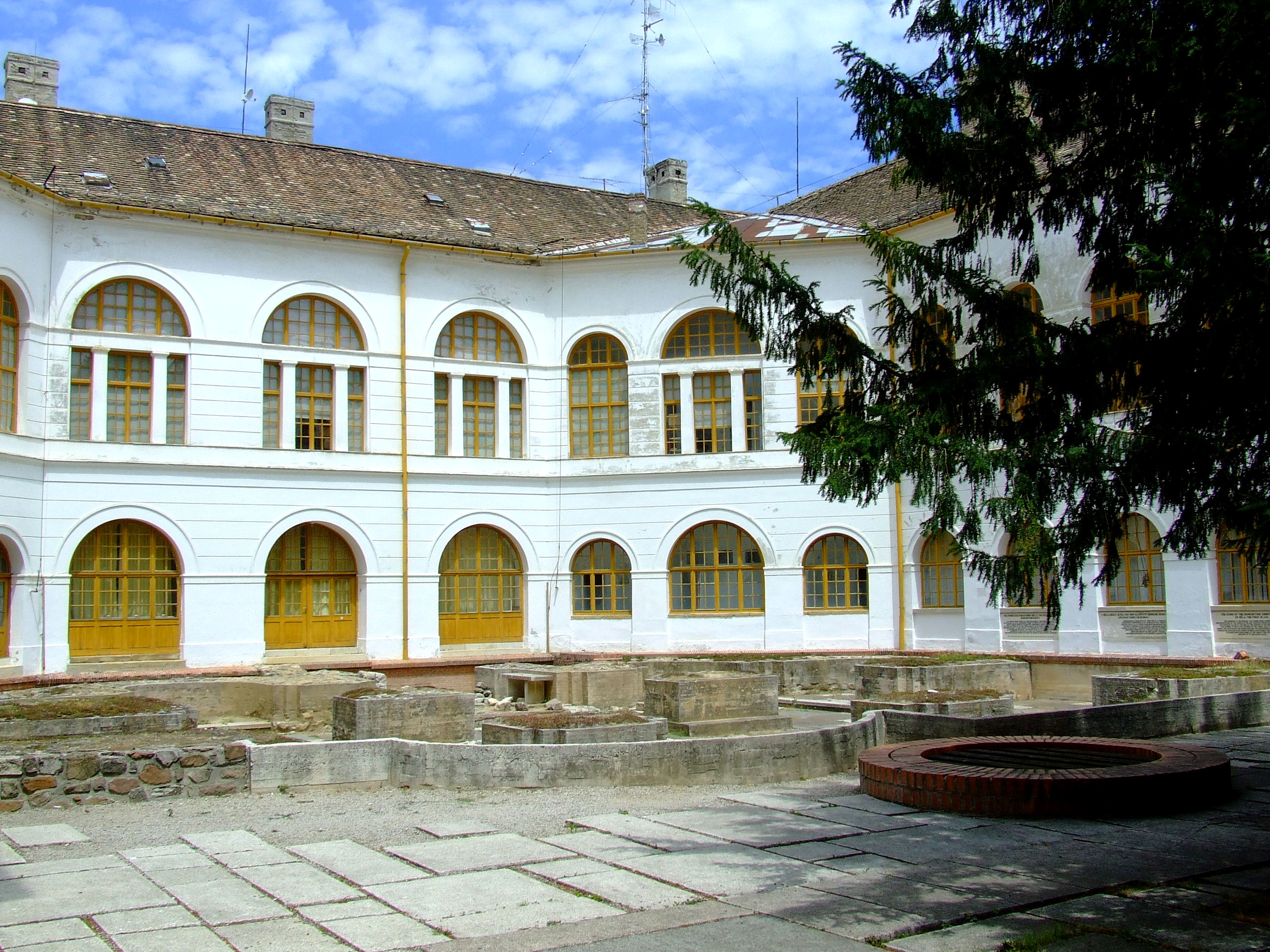 Az I. Béla által 1061-ben alapított Szekszárdi Benedek rendi apátság romjai a Pollack Mihály tervei szerint épült megyeháza udvarán